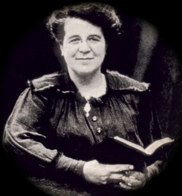 Madeleine BLocher-Saillens (1881-1971), première femme pasteur du protestantisme français (1929)